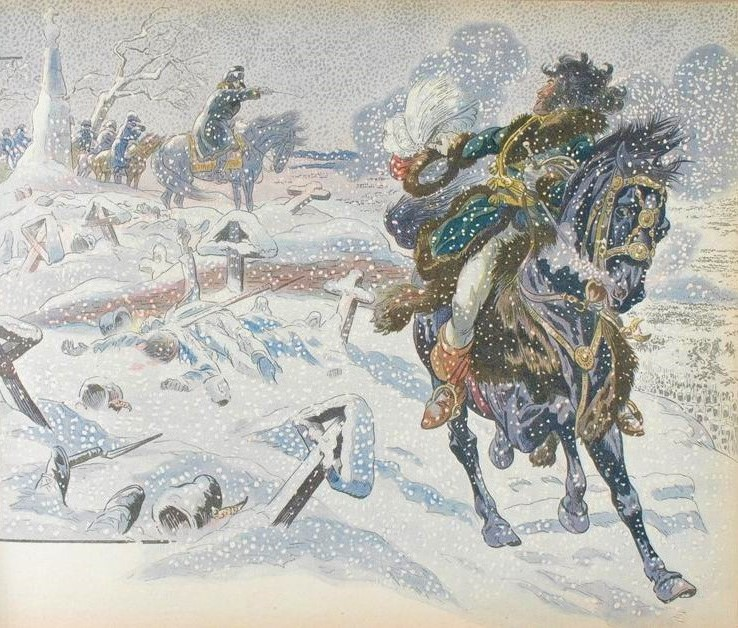 Bataille d'Eylau, 8 février 1807 : Napoléon donne l'ordre au maréchal Murat de charger les Russes avec la cavalerie française.